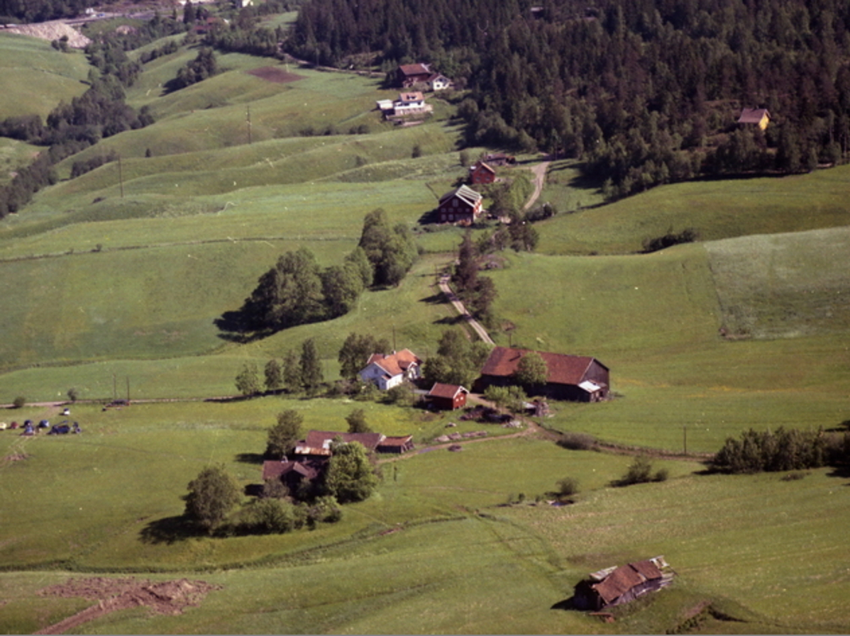 Midtre Tokerud midt i bildet. Tokerud i front, Vestli gård bakerst i skogkanten. Tokerudveien mellom gårdene. I bakgrunnen ses Trondheimsveien ved Skillebekk. Bilde fra 1962. Foto: Ukjent / Widerøes Flyveselskap / Oslo byarkiv.